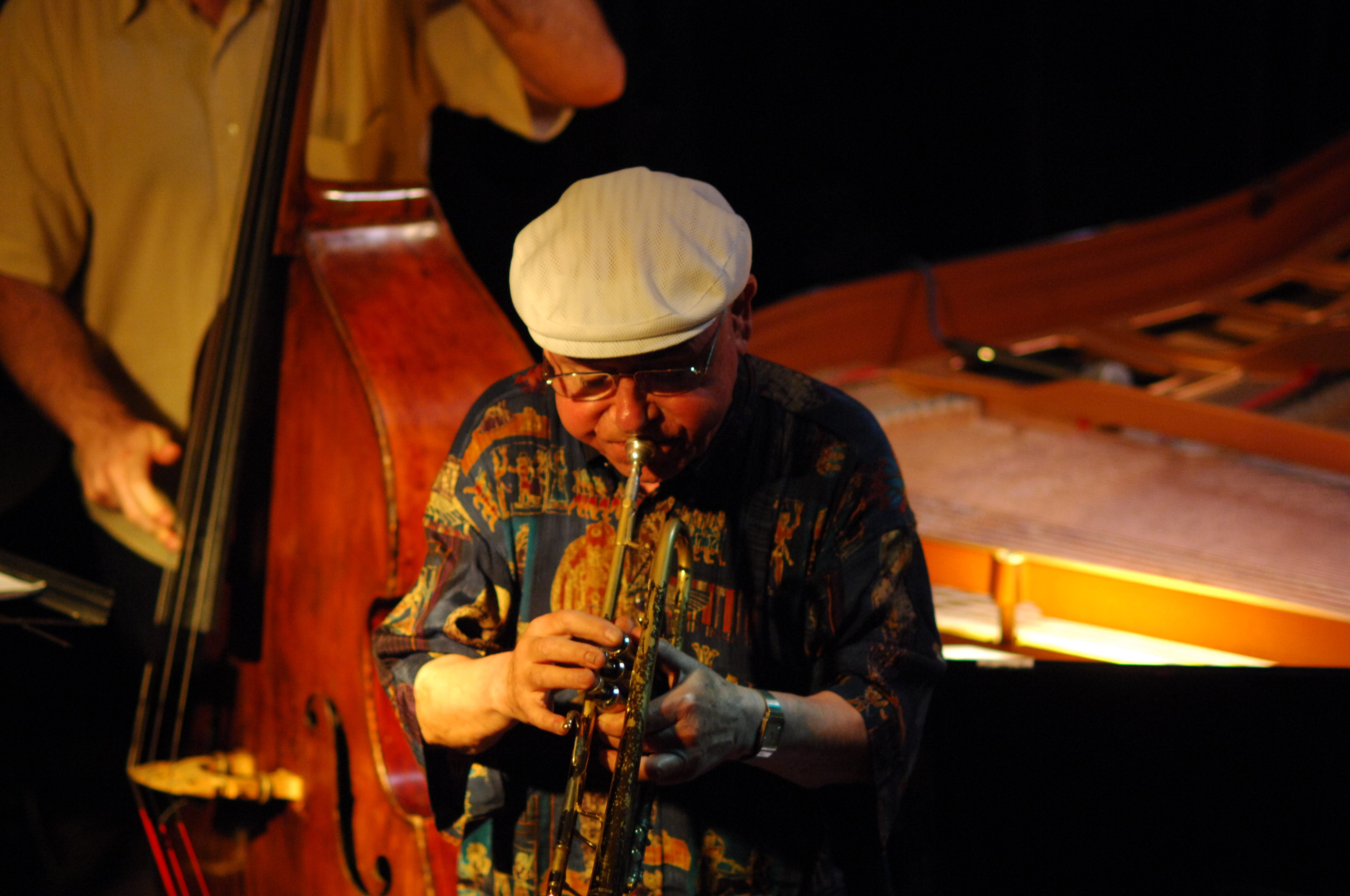 Caz müzisyeni